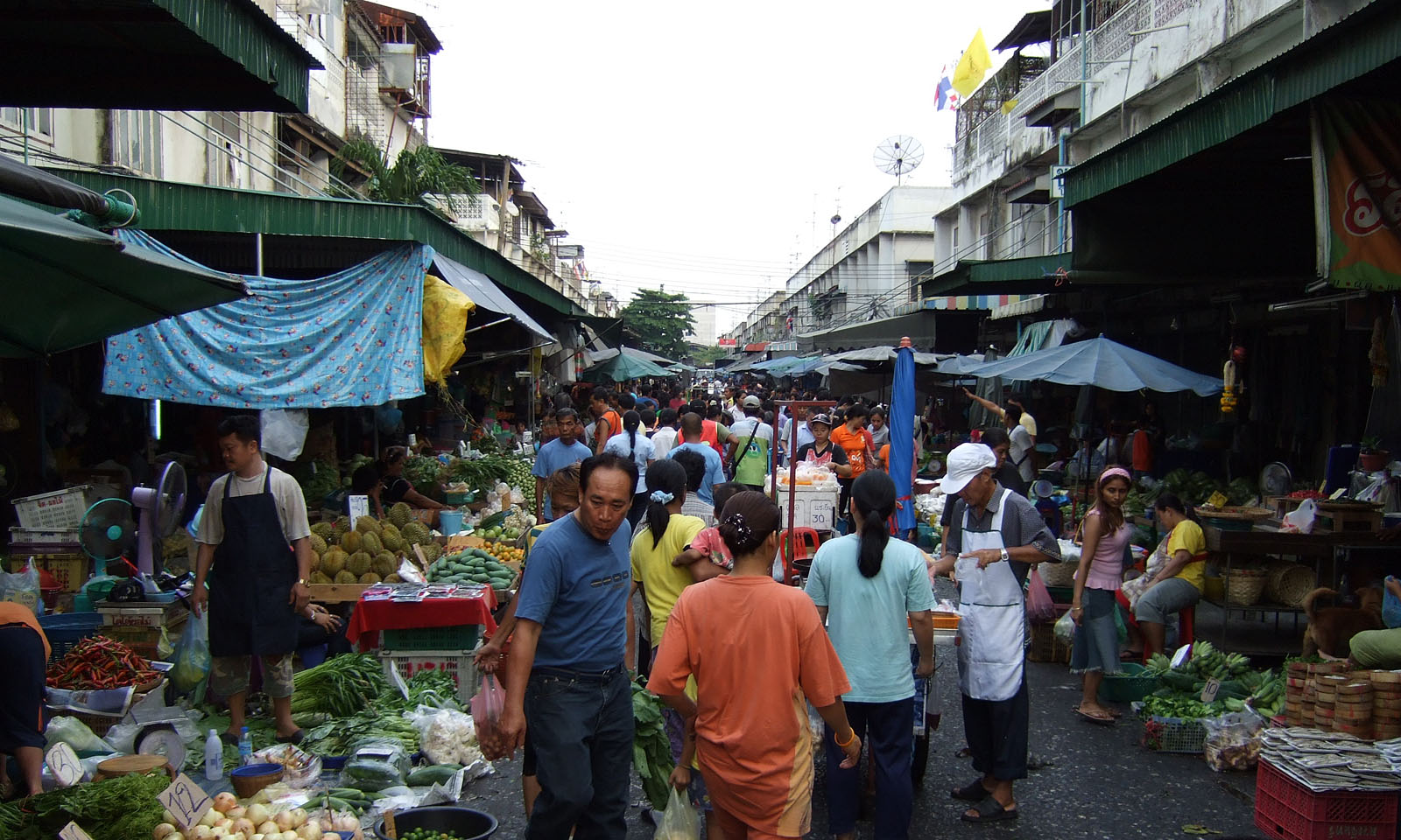 Klong-Toey Market, Bangkok